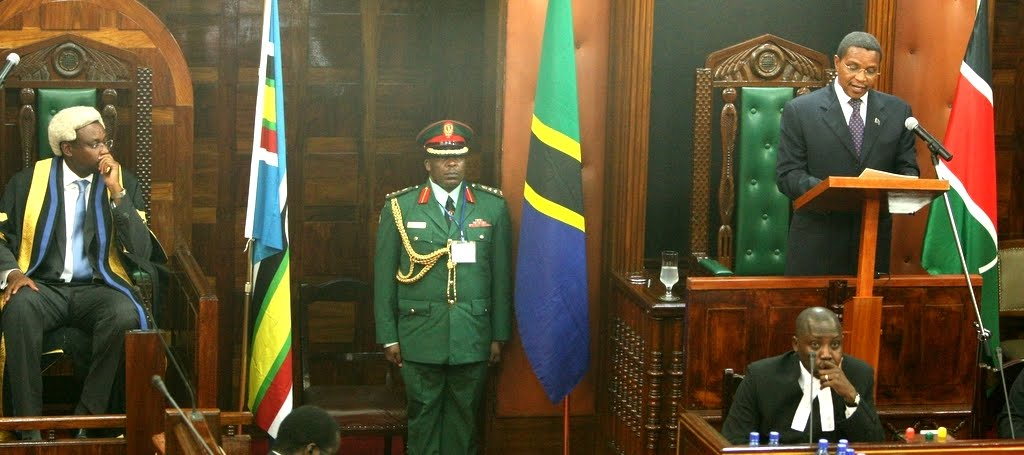 Raisi akihutubia bunge la Jamhuri ya Afrika Mashariki, siku ya Jumanne